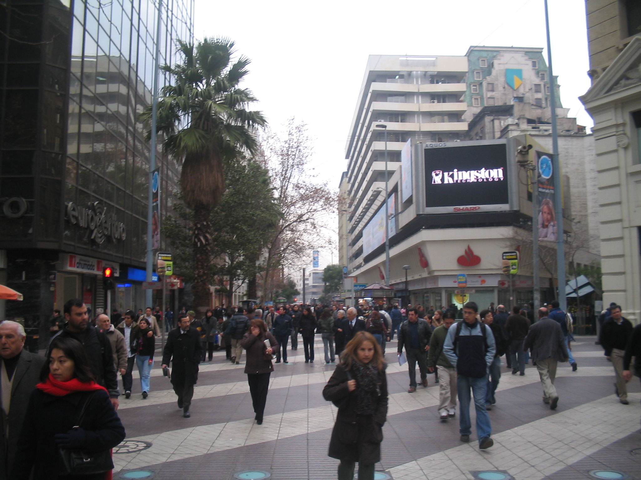 Pěší třída Paseo Ahumada, Santiago de Chile